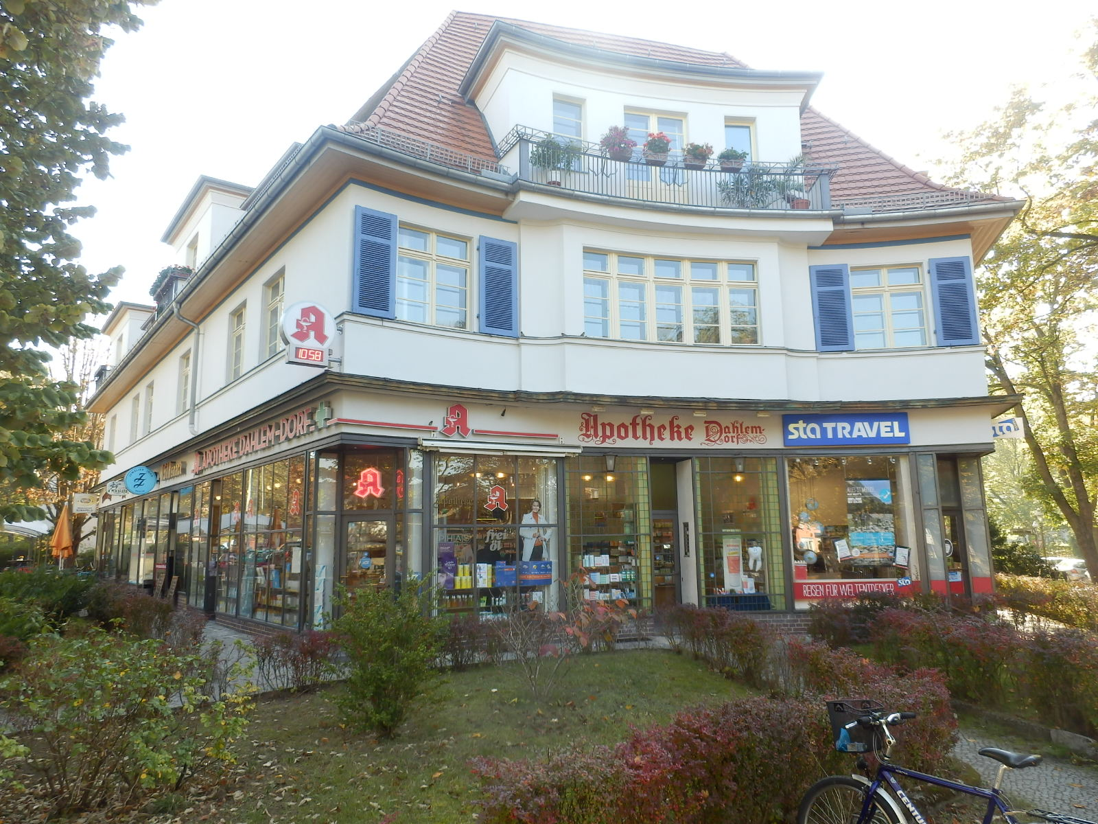 Wohn- und Geschäftshaus Königin-Luise-Straße 38 / Takustraße 47 mit der "Apotheke Dahlem-Dorf"